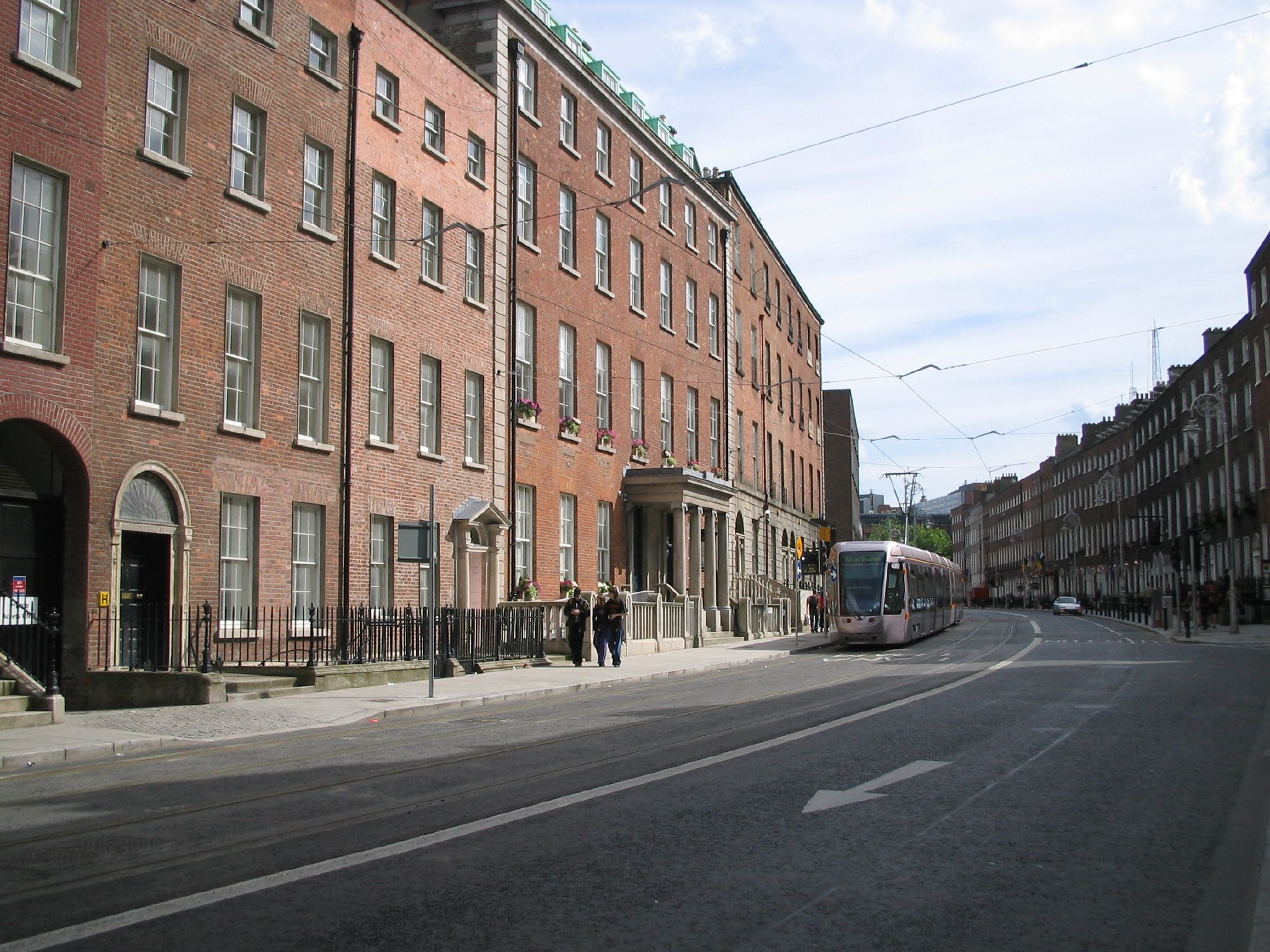 HARCOURT STREET